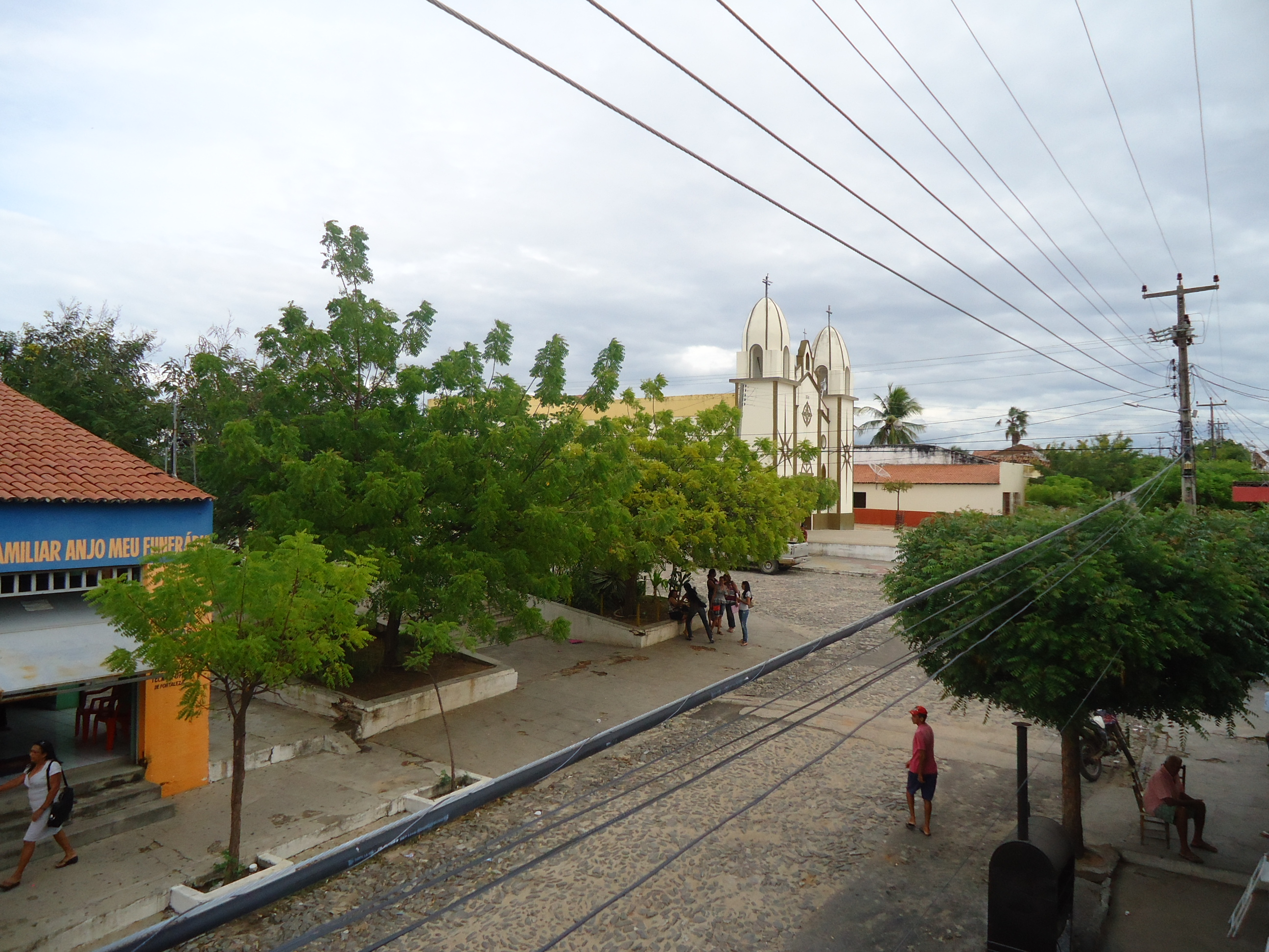 Feiticeiro